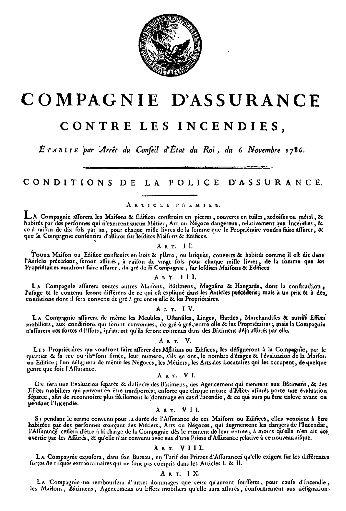 Conditions de la police d'assurance, 1ère page